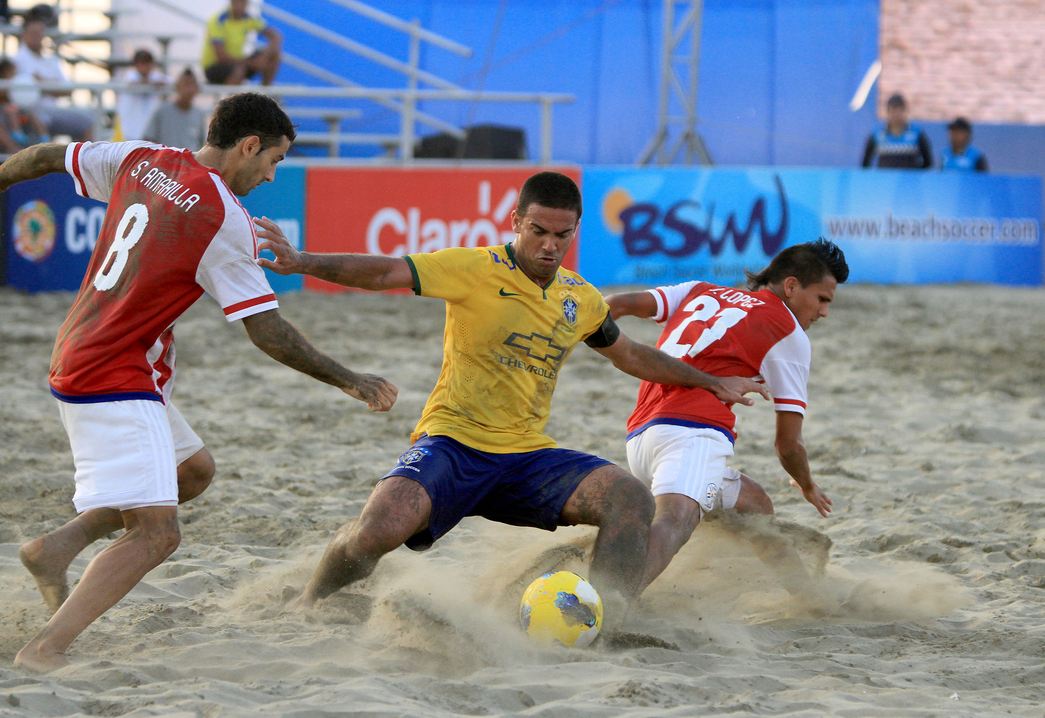 Manta, 26 de abr (Andes).-Daniel Lima, jugador de Brasil disputa la pelota con Sebastían Amarilla y Juan López de Paraguay en el partido de la final del Sudamericano de Playa, donde el equipo "carioca" se adjudico el campeonato Foto:César Muñoz/Andes